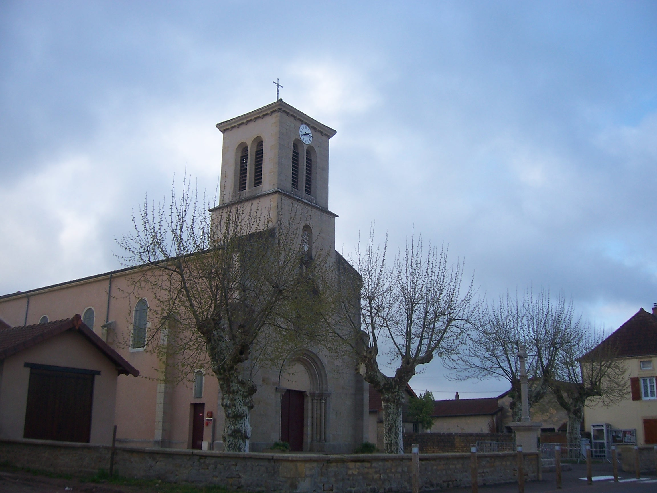 Eglise de Saint-Edmond